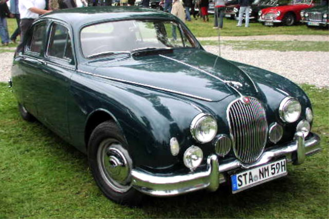 Jaguar 2.4 (1955)